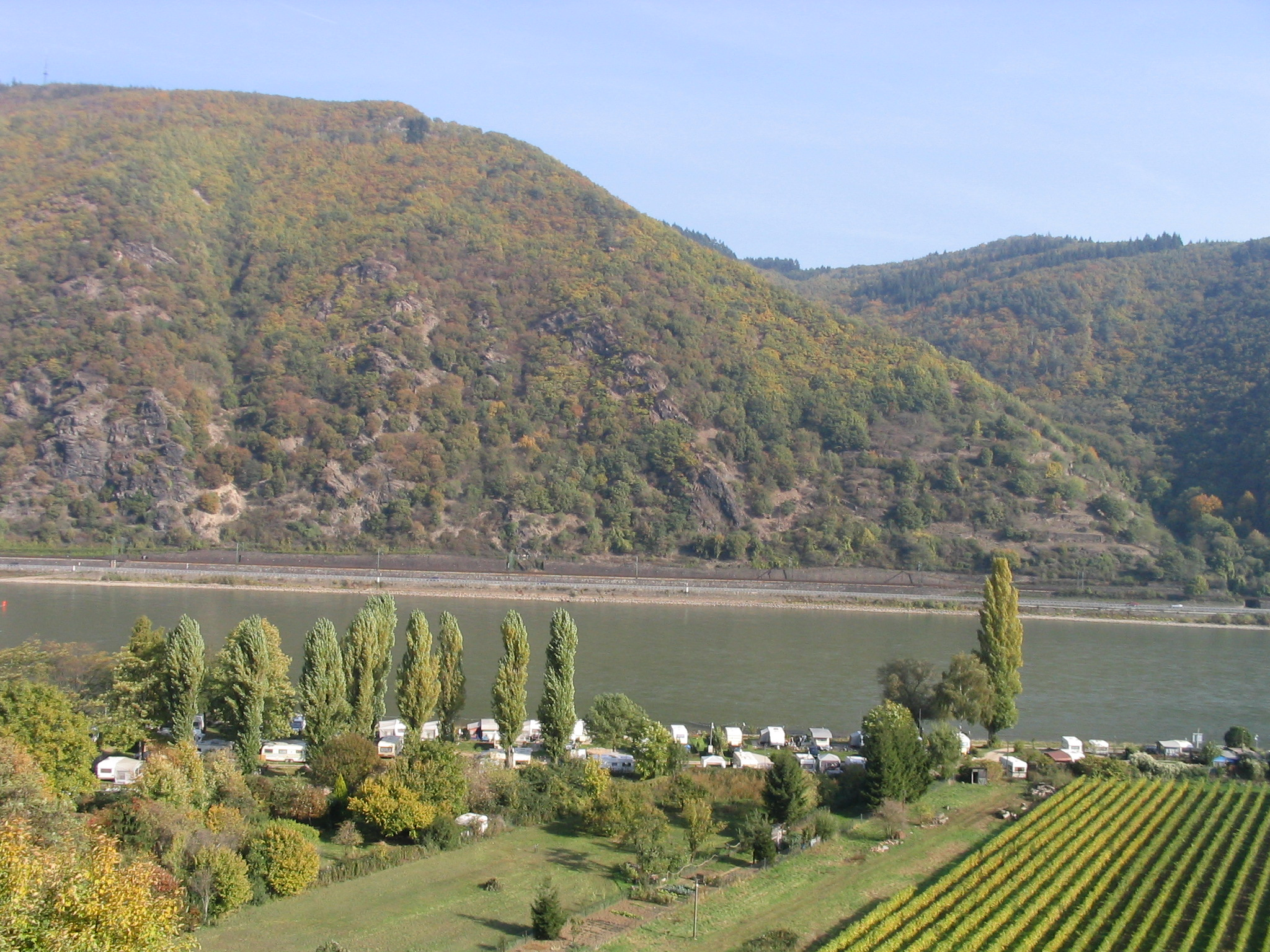 Blick ins Mittelrheintal, zwischen Bingen und Trechtingshausen, Aufnahmedatum: 19.10.2003 Autor: Dr. Hagen Graebner